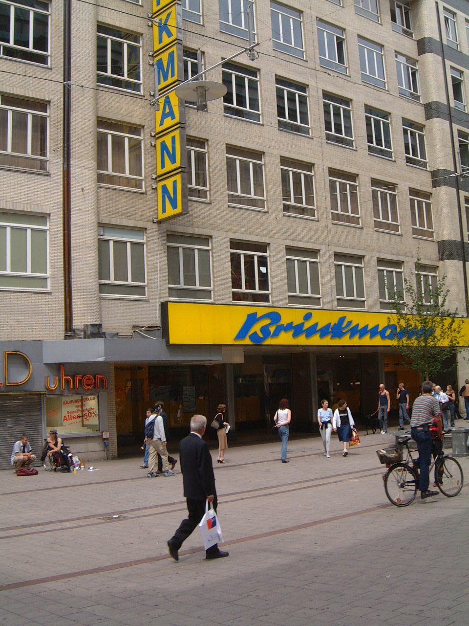 Technik-Kaufhaus Ernst Brinkmann in der Spitalerstraße, Hamburg